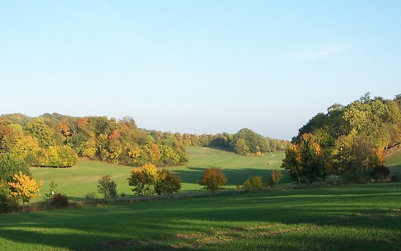 Mecklenburger Schweiz zwischen Remplin und Hohen Mistorf